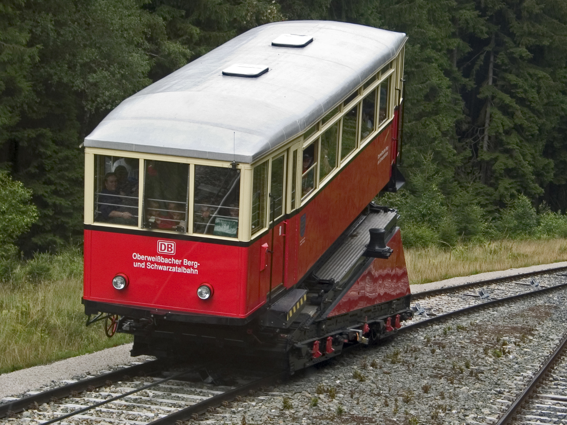 Oberweißbacher Bergbahn - Güterbühne mit Aufsatzwagen